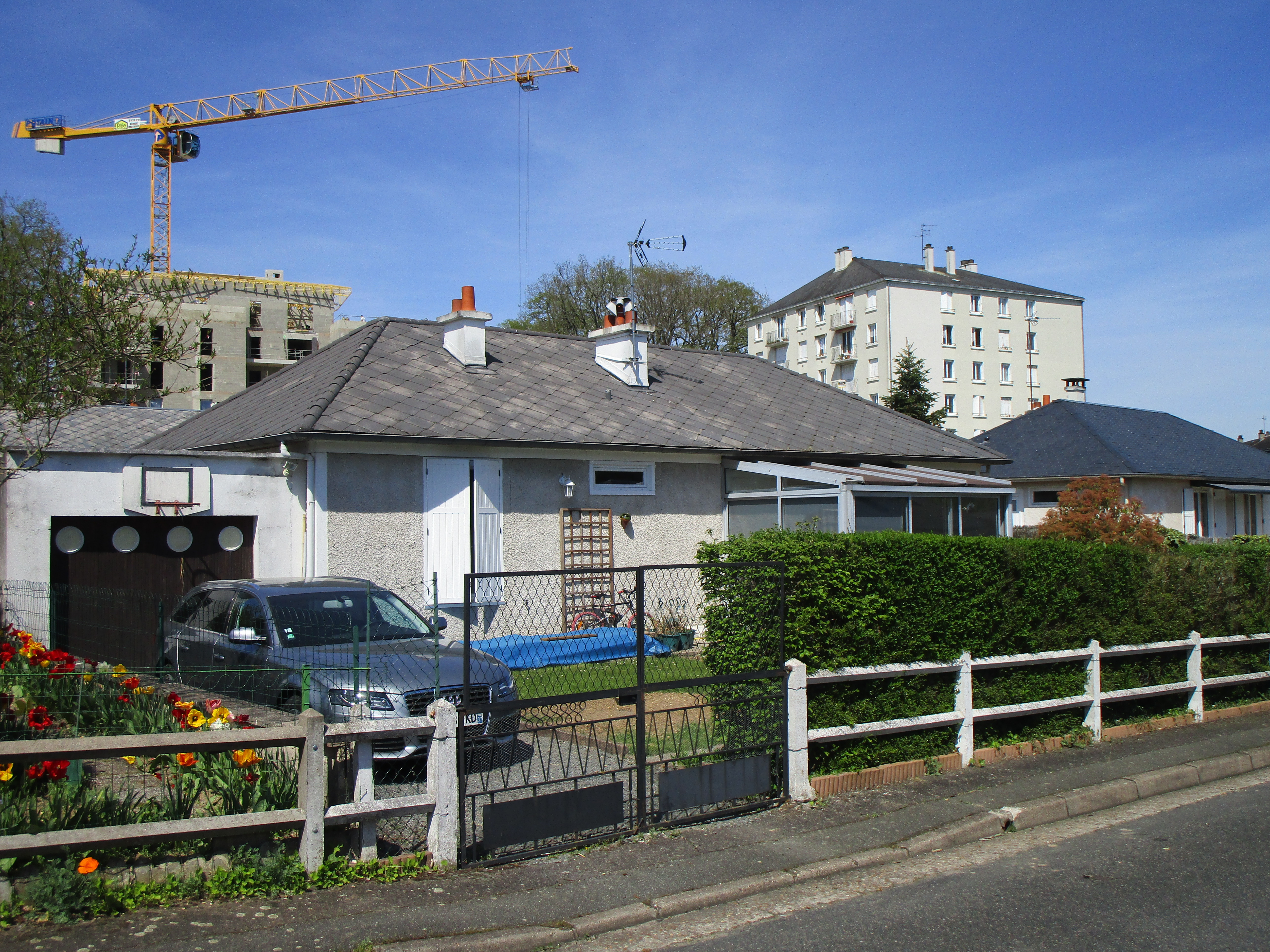 Pavillons situés à l'est du campus universitaire de Grandmont, dans le quartier Montjoyeux de Tours